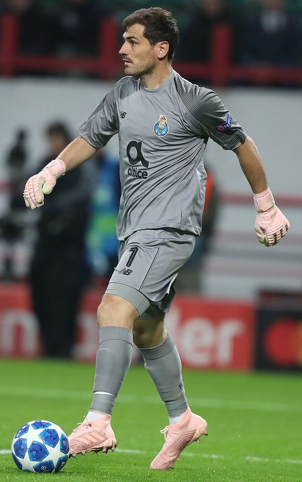 «Локомотив» терпит очередное поражение в Лиге чемпионов